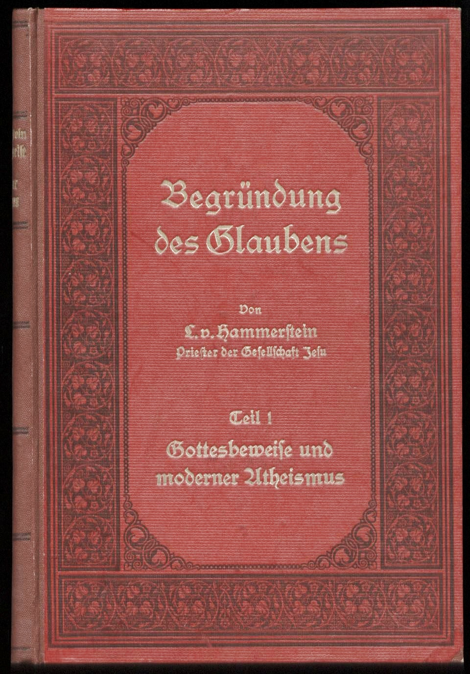 Ludwig von Hammerstein (1832-1905), deutscher Jesuit und Schriftsteller, Bucheinband 1903